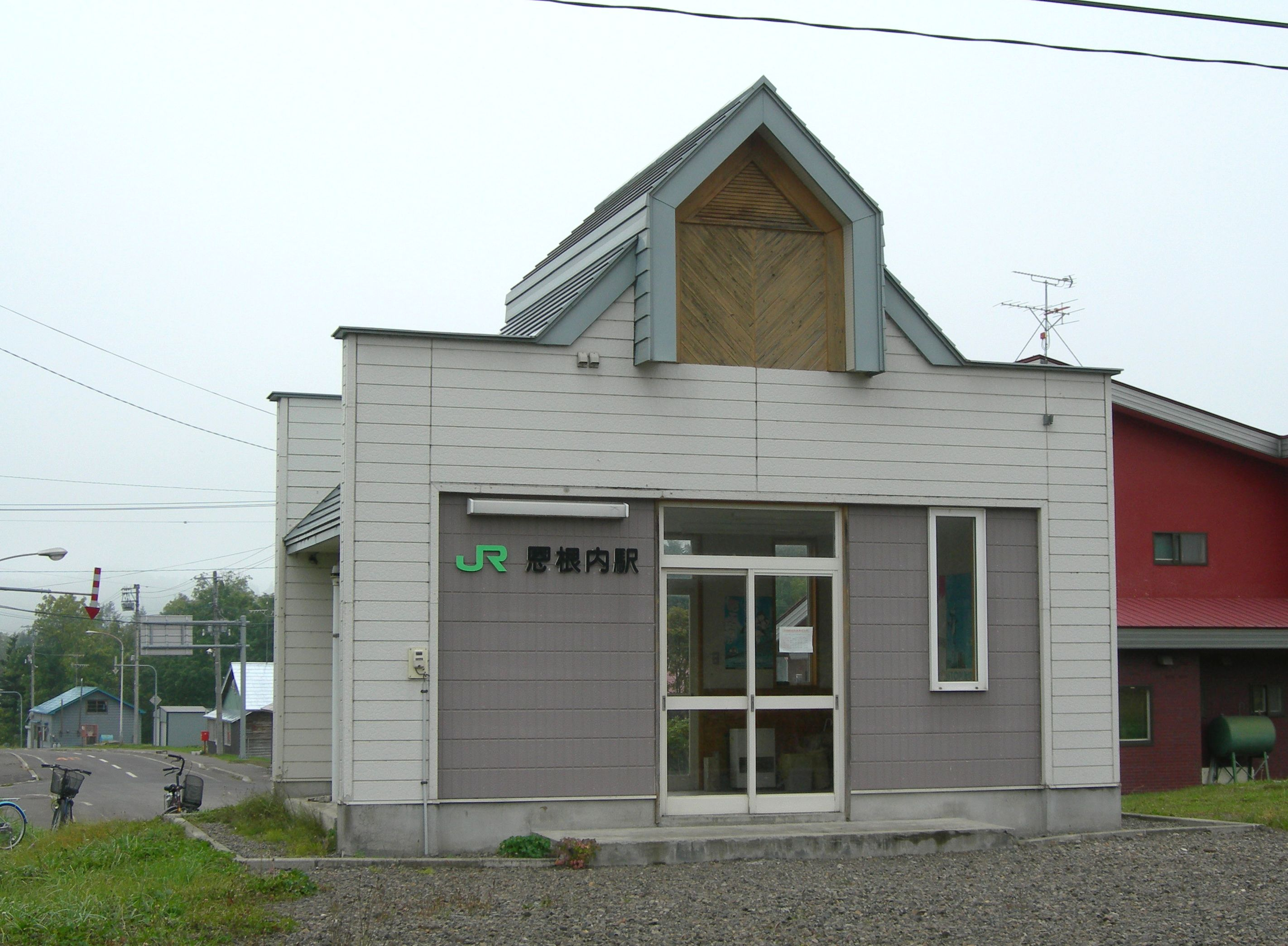 恩根内駅駅舎